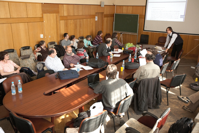 На Заседании, посвященном 80-летнему юбилею В. А. Дыбо (Москва, РГГУ, 05.05.2011). По часовой стрелке слева направо сидят за столом: Виктор Яковлевич Порхомовский, Илья Иосифович Пейрос, Ольга Валерьевна Столбова, Андрей Анатольевич Зализняк, Владимир Антонович Дыбо, Сергей Григорьевич Болотов, Георгий Сергеевич Старостин, двое неизвестных, Михаил Александрович Живлов.